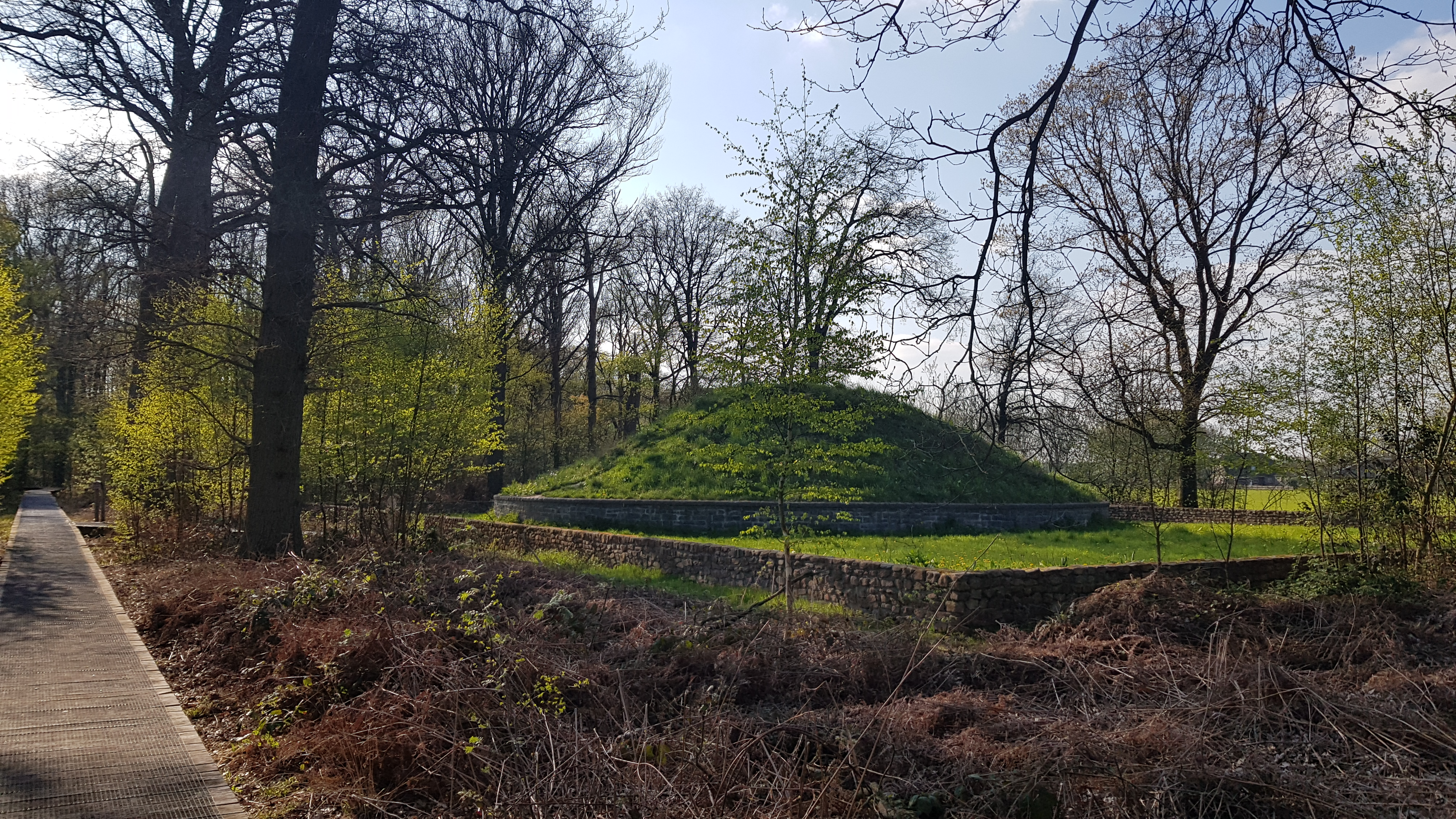 Kaboutersberg, Hoogeloon, Nederland